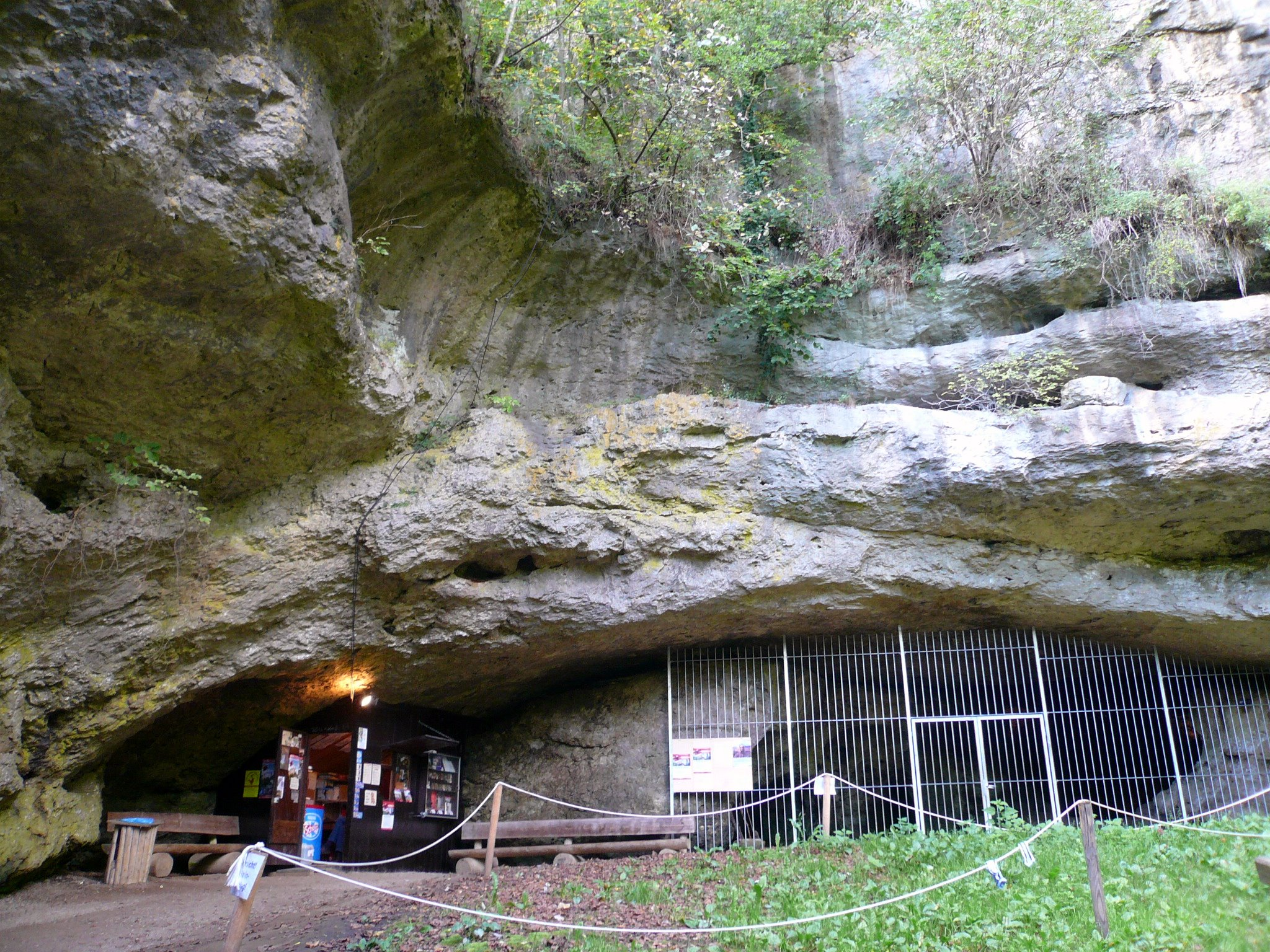 Sophienhöhle, Eingang mit Kasse